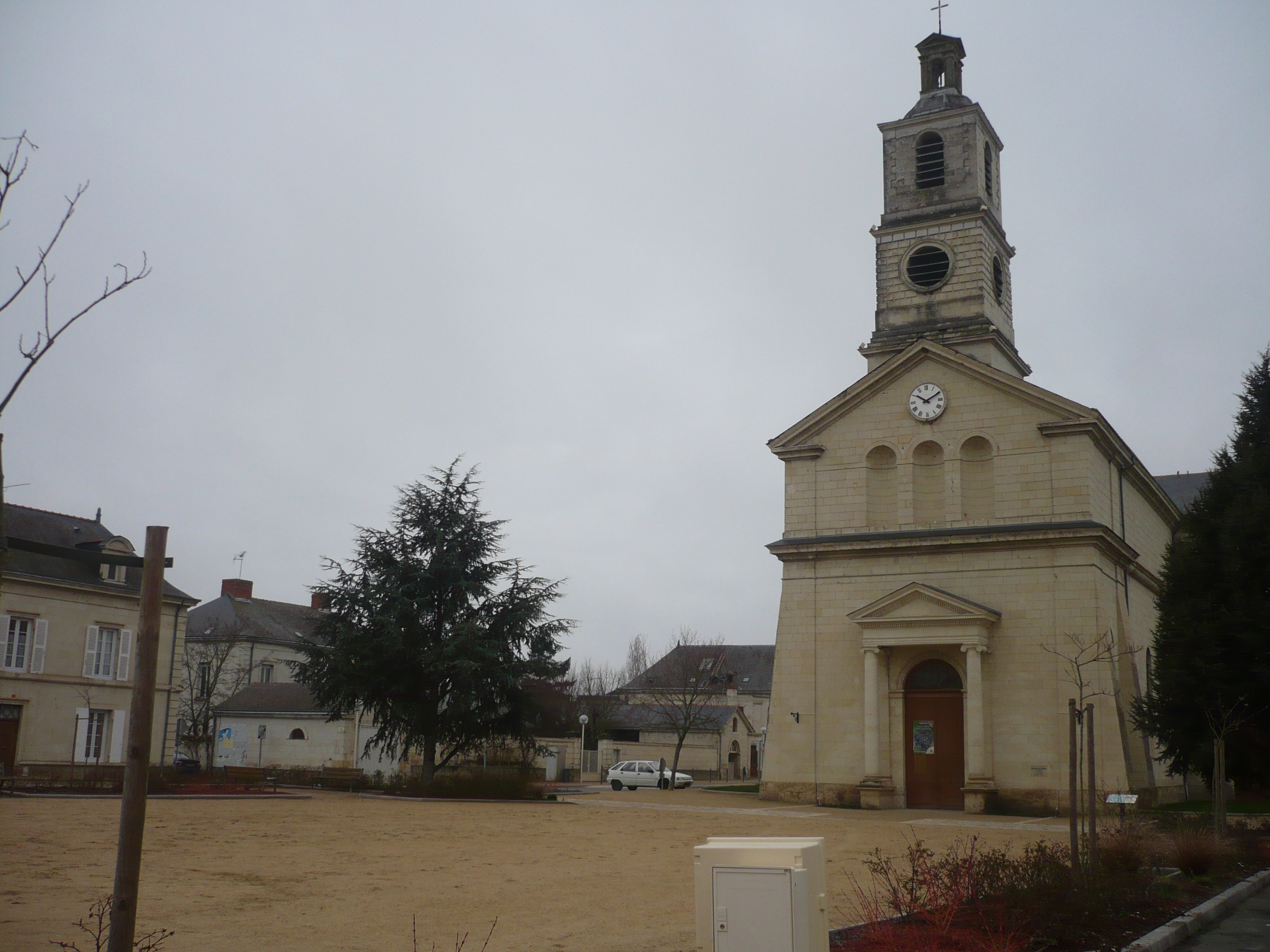 Eglise de la Ménitré